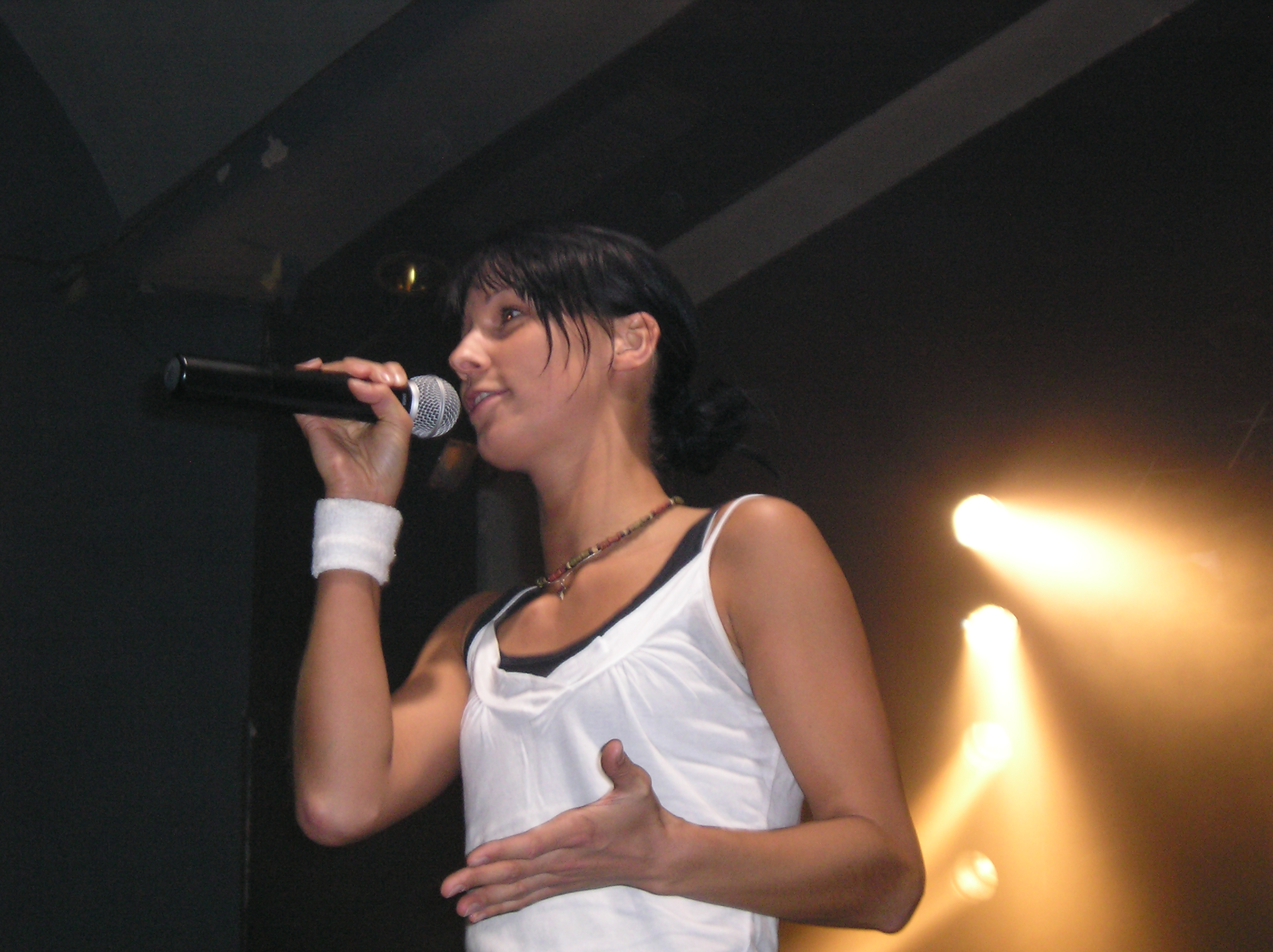 Christina Stürmer, Konzert in Hannover